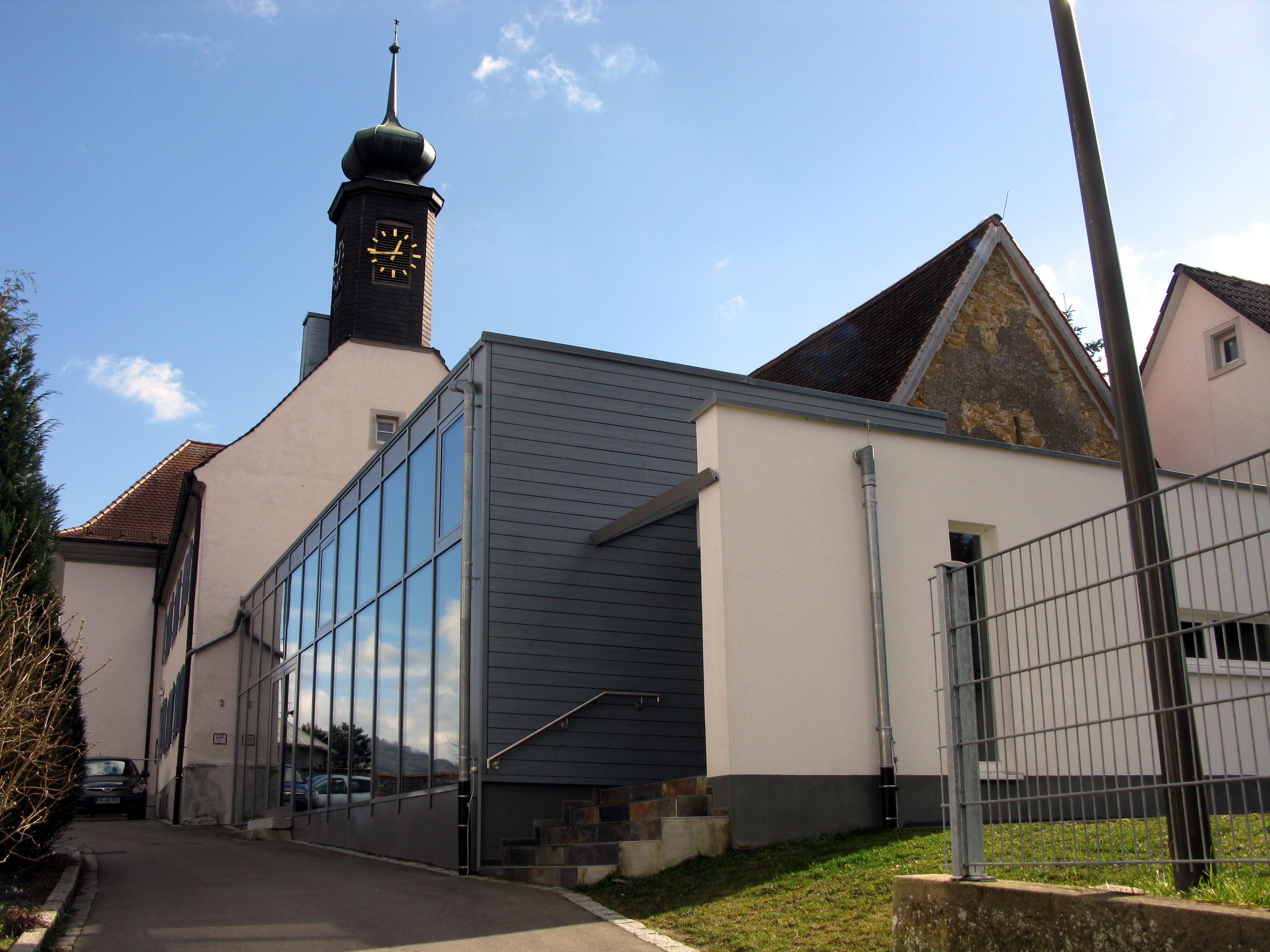 Käppele in Schallstadt, im Vordergrund die umbaute Scheune als Veranstaltungsstätte